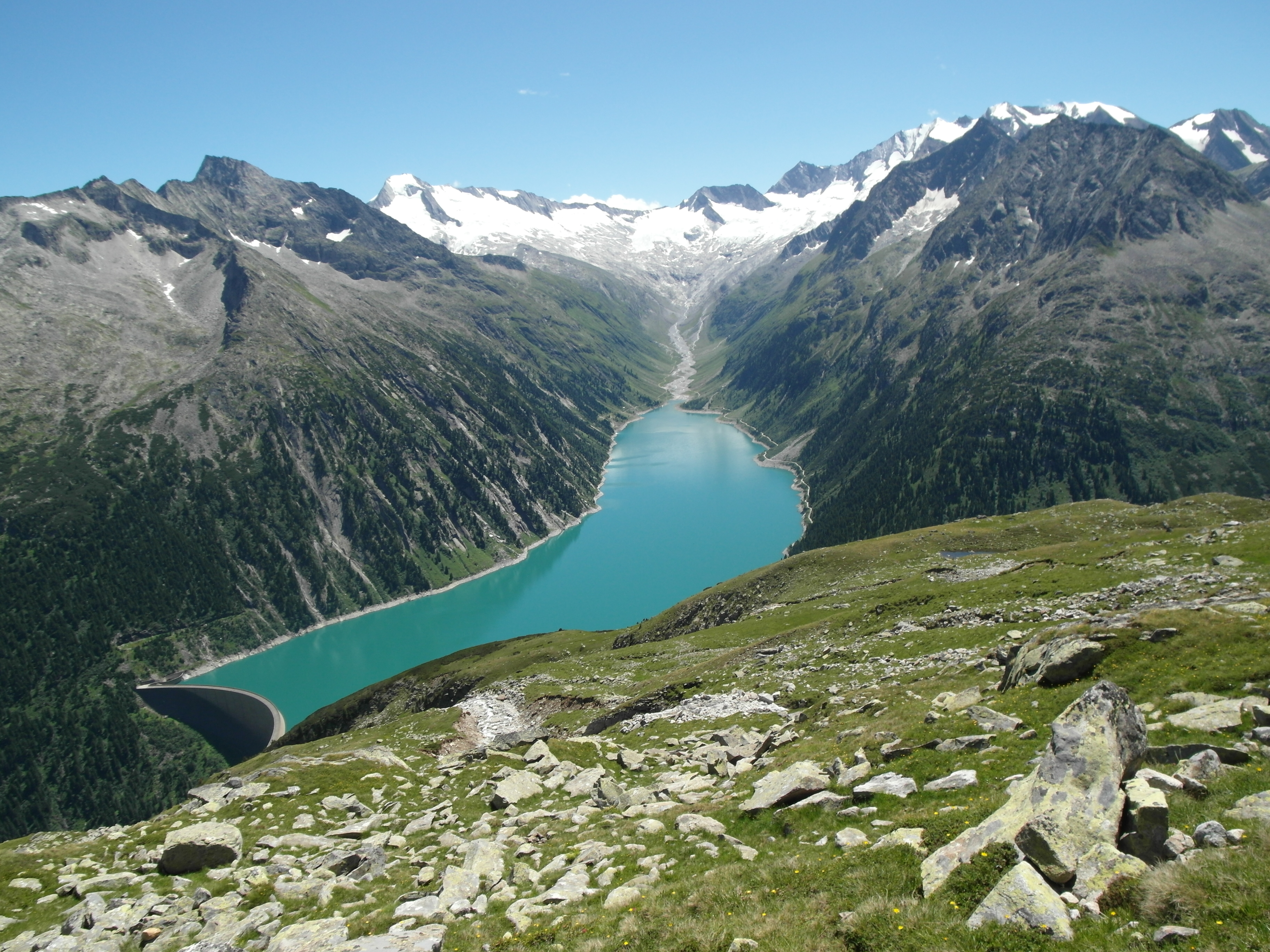 Blick vom Schlegeisspeicher von Höhenweg aus.